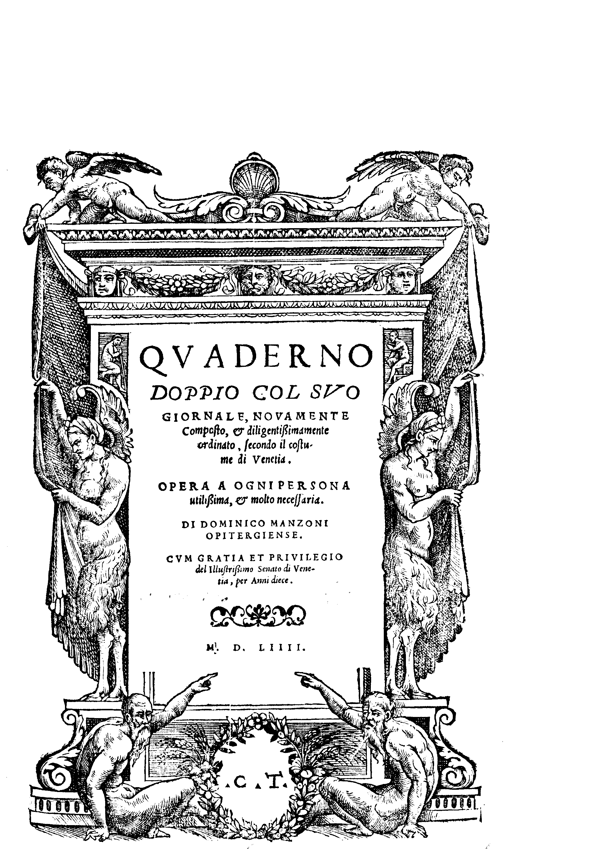 Quaderno doppio col suo giornale, nouamente composto, & diligentissimamente ordinato, secondo il costume di Venetia. Opera a ogni persona utilissima, & molto necessaria. Di Dominico Manzoni Opitergiense .... - [Venezia : Comin da Trino], 1554 (In Vinegia : per Comin da Trino di Monferrato). - [16], 20, [8], 47, [1] c. ; 4º. - Tre front.interni .